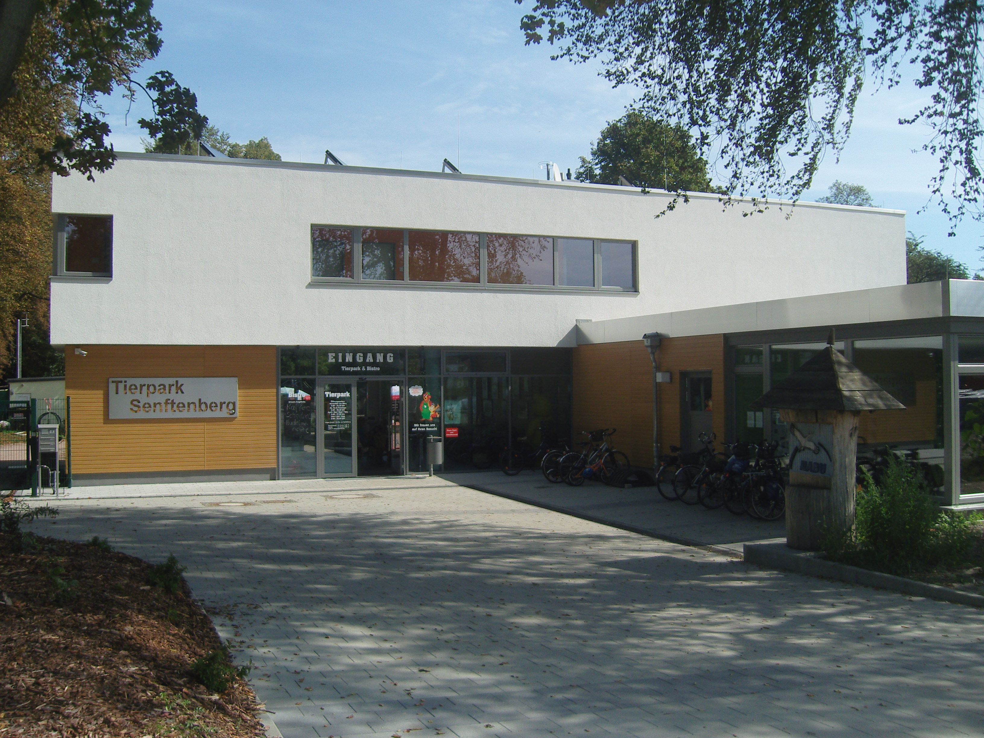 Eingangsgebäude zum Tierpark Senftenberg